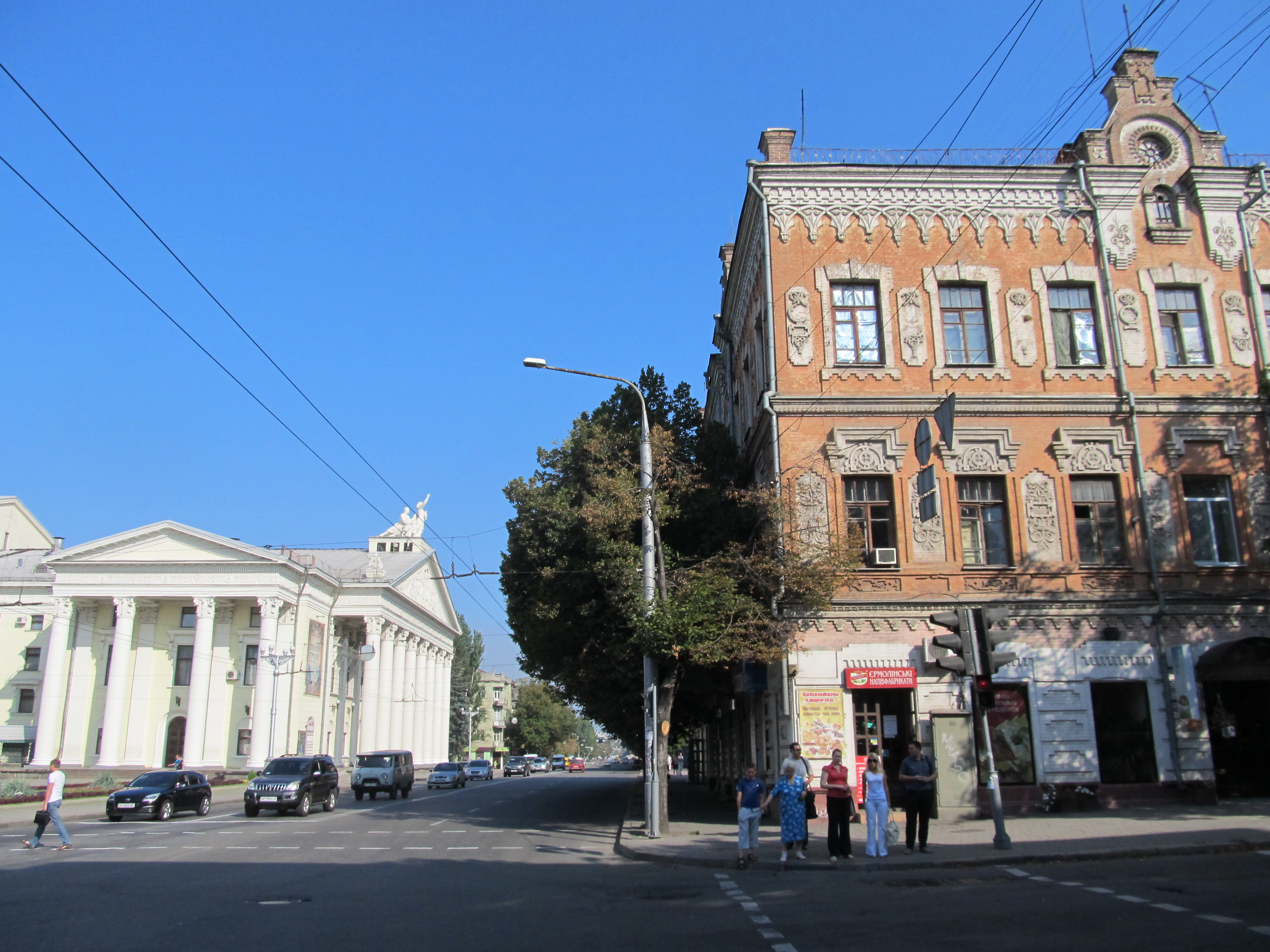 Прибутковий будинок Я.І. Лещинського, де містилася Перша Олександрівська Рада робітничих, солдатських і селянських депутатів, Запоріжжя, просп. Леніна, 52/25